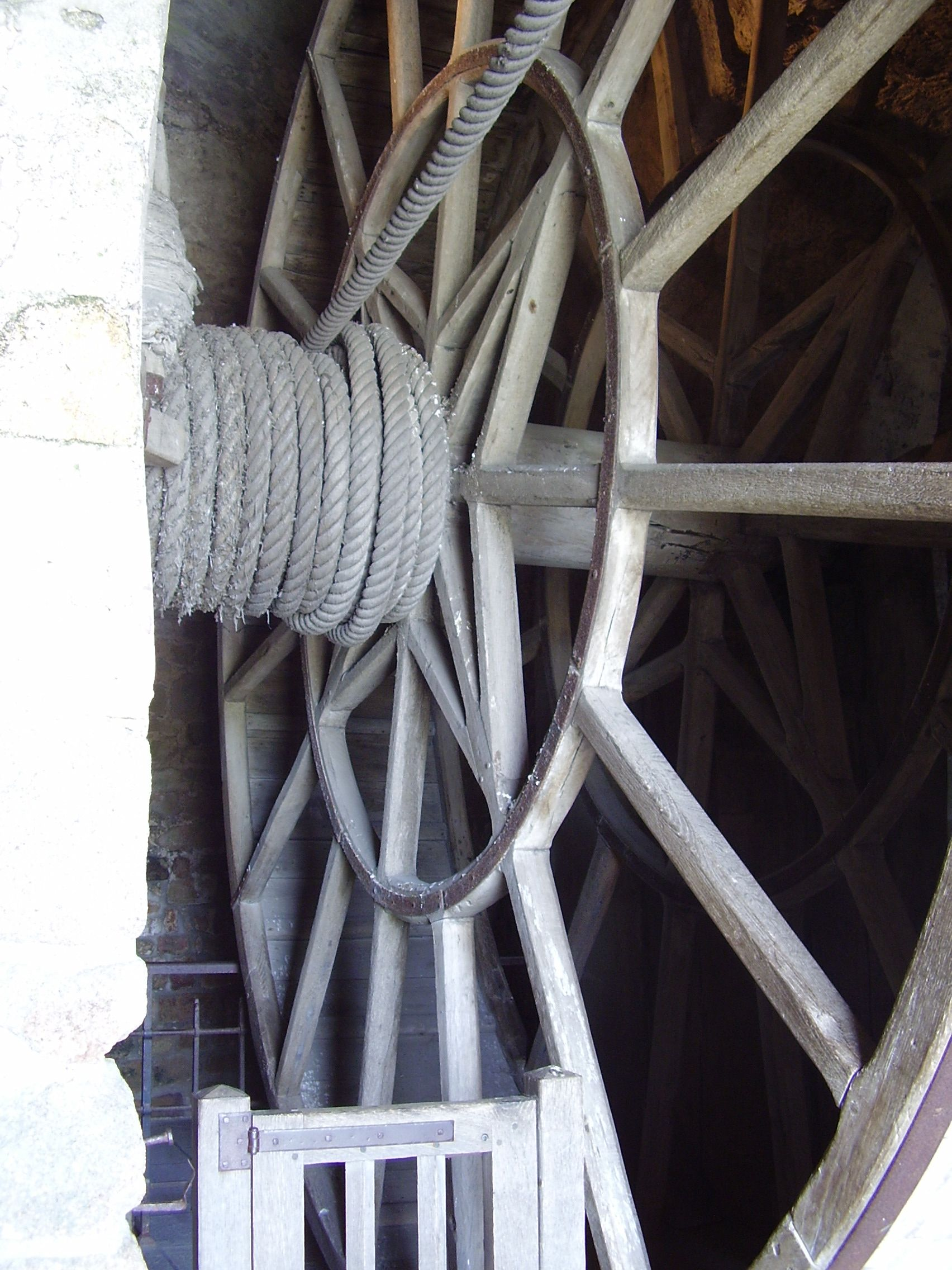 Mont Saint-Michel; Frankreich